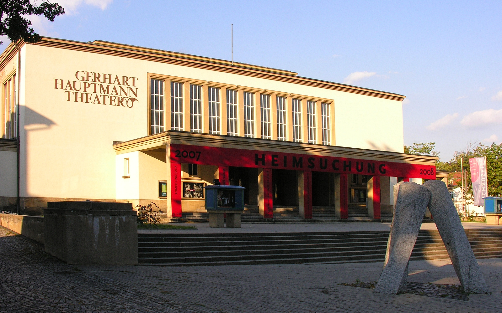 Gerhart Hauptmann Theater Zittau noch vor dem Umbau. Zu erkennen ist noch der alte kupferne Schriftzug oben links an der Fassade. Die Säulen am Eingang sind noch im Originalzustand ohne der Verglasung, die durch den Umbau hinzugekommenen ist.